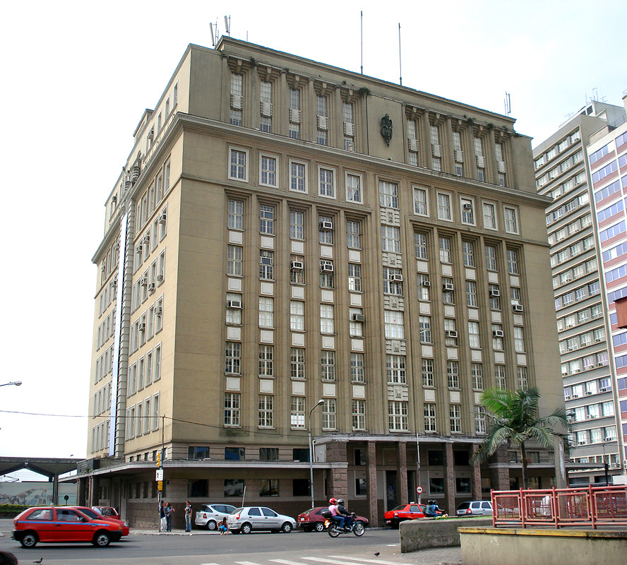 Palácio do Comércio de Porto Alegre. Obra de Franz Joseph Seraph Lutzenberger, conhecido como José Lutzenberger (pai). Erguido entre 1937 e 1940.